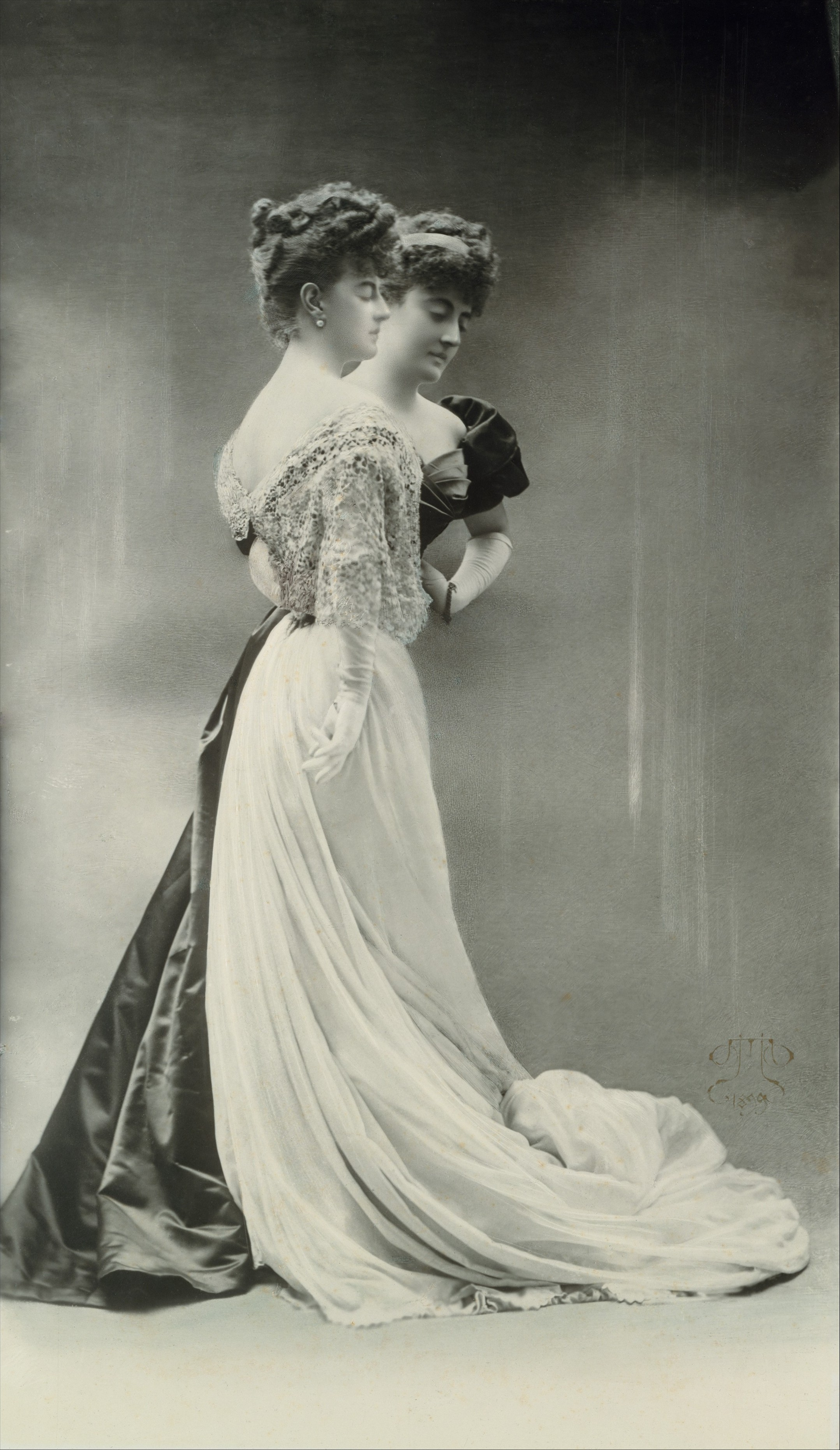 La comtesse Greffulhe (Élisabeth de Riquet de Caraman), photo par Otto Wegener (signée en bas à droite, 1899), dimensions : 69 x 39.8 cm (27 3/16 x 15 11/16 in.). Deux fois représentée sur le même cliché par un trucage du négatif. Metropolitan Museum of New York, collection Gilman, don 2005. N° inv : 2005.100.622